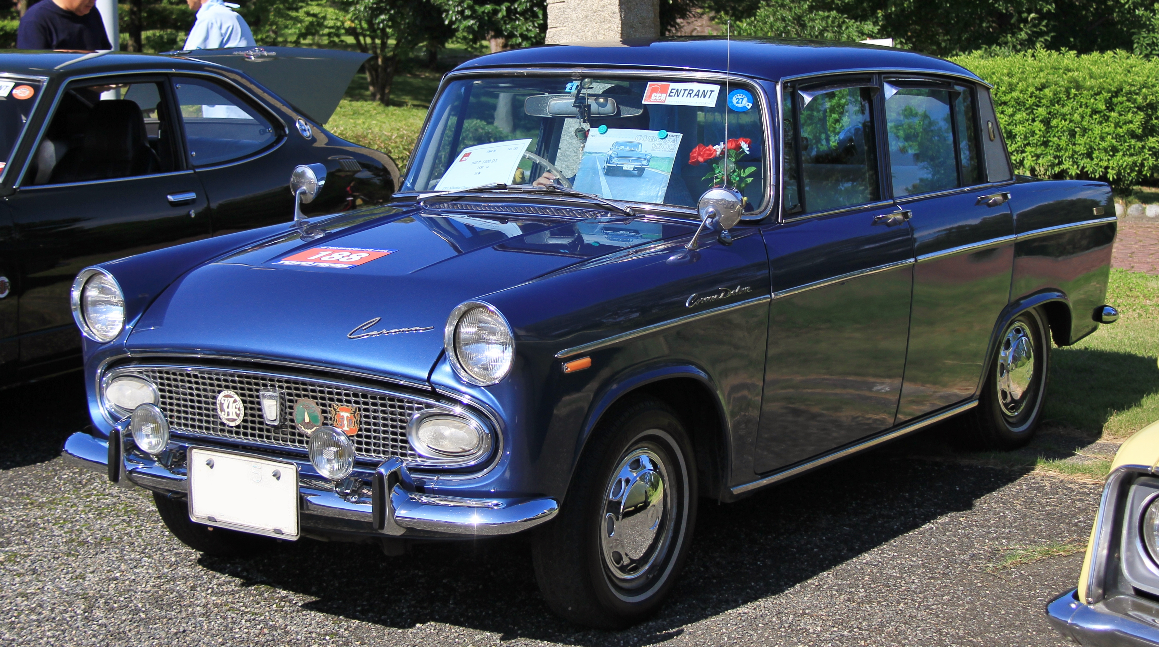 Toyopet Corona